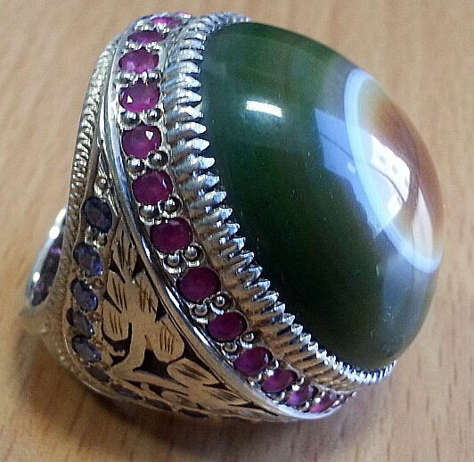 انگشتر باباقوری